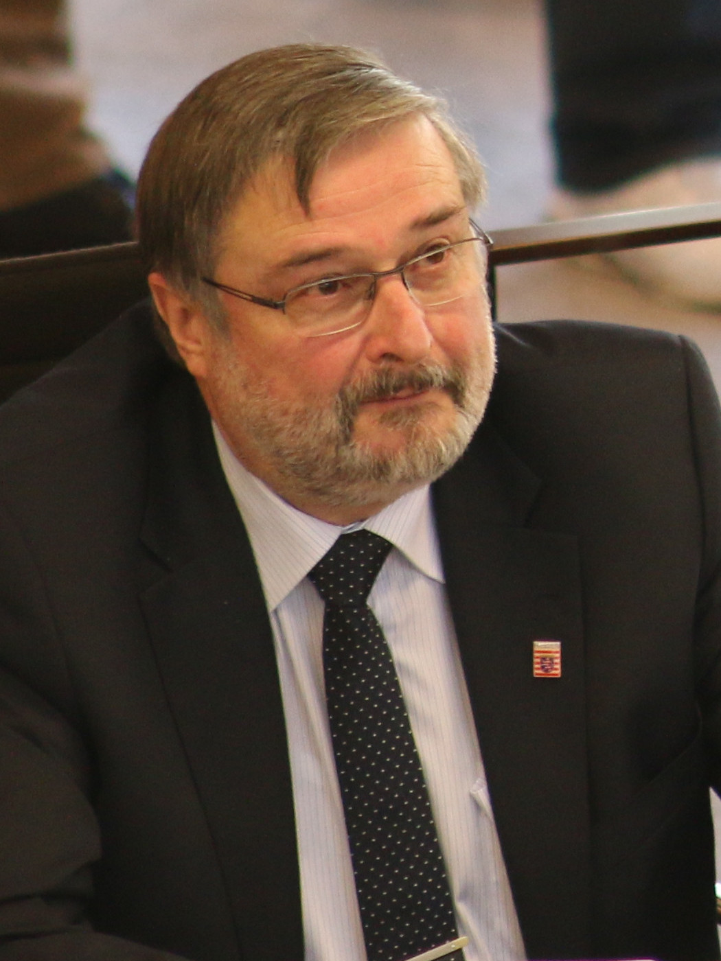 Konstituierende Sitzung des Hessischen Landtags 2014: Joachim Veyhelmann (MdL) von der CDU-Fraktion